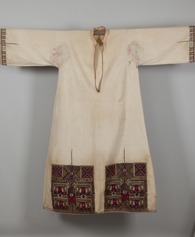 Νυφικό υπόλευκο πουκάμισο Επισκοπή Ημαθίας, Μακεδονία. Αρχές 20ού αιώνα Συλλογή Πελοποννησιακού Λαογραφικού Ιδρύματος, Ναύπλιο / 1990.6.507